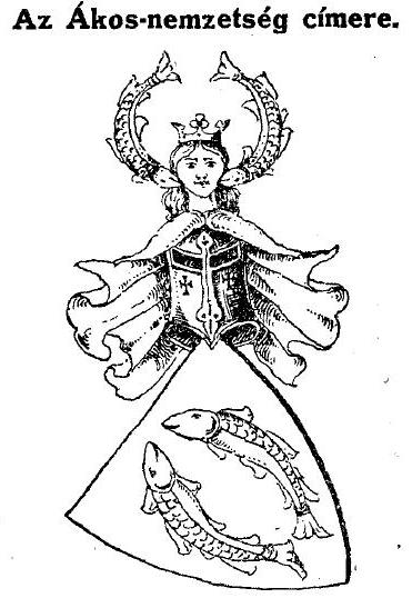 Az Ákos nemzetség címere Illusztráció Horváth Sándor "A középkori magyar címertan jelképezése" című művéből. A művészi címerrajzokat Rákóczy Aladár készítette.